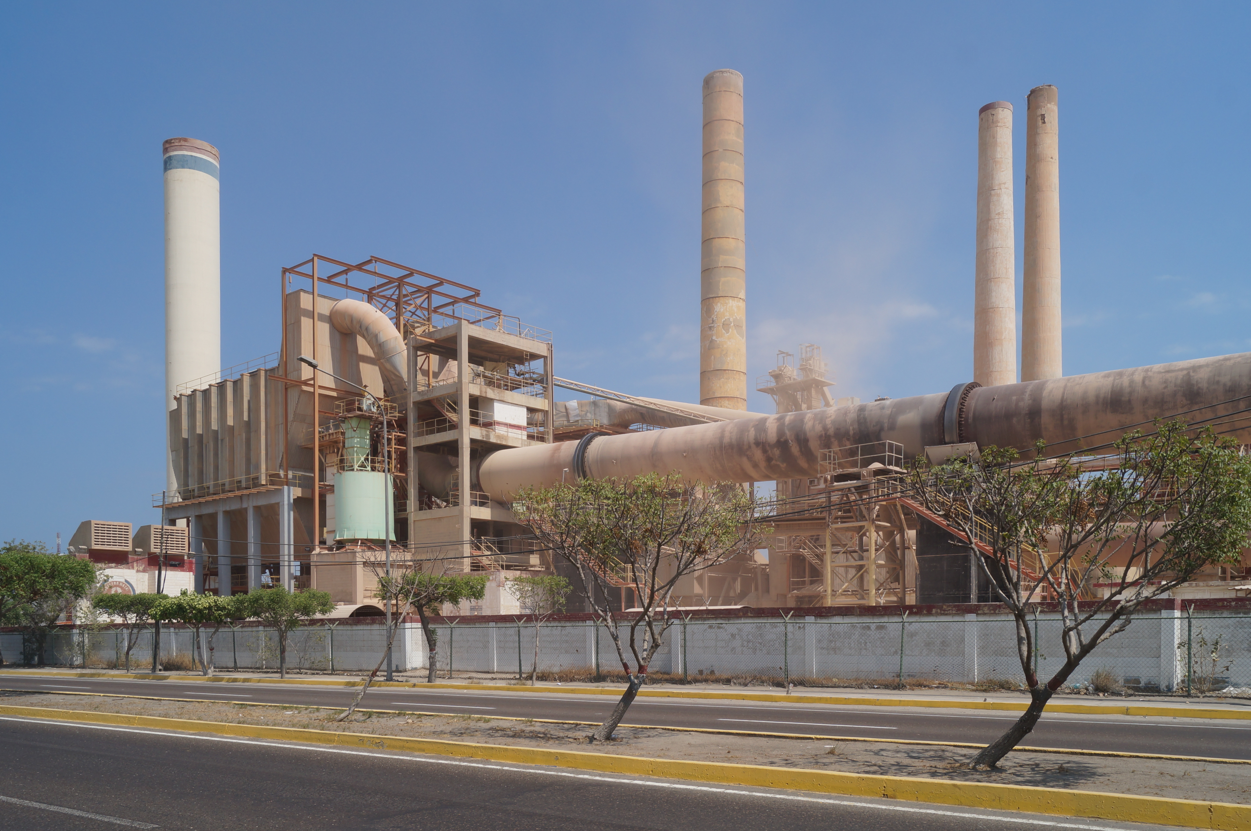 Fabrica de cementos. Maracaibo. Venezuela.